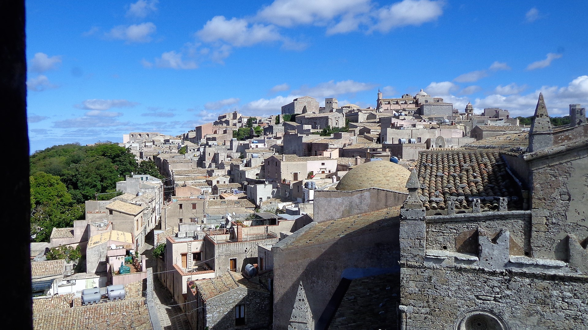 Panorama dal campanile della chiesa madre